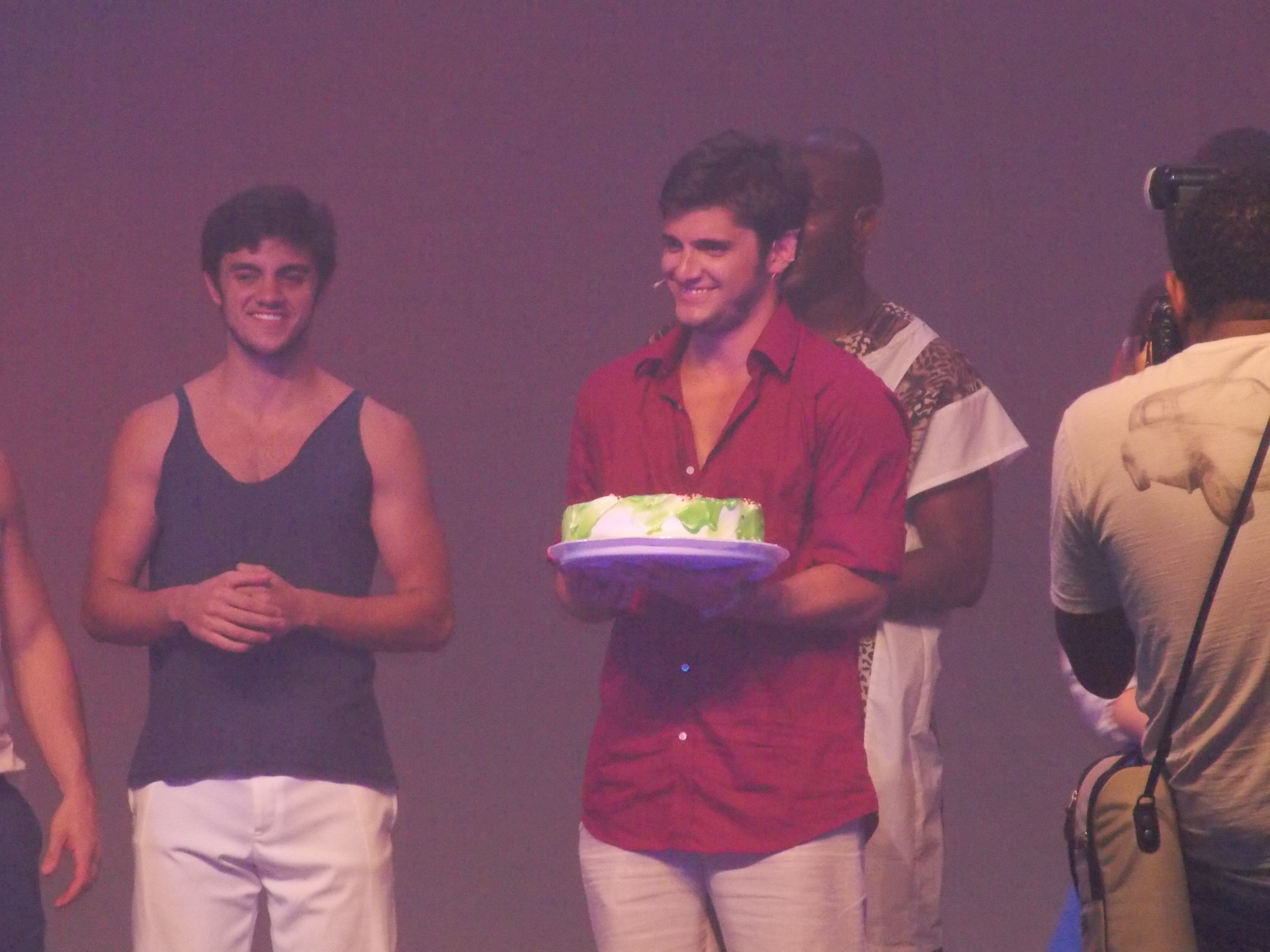 Evento: Festa Internacional de Teatro de Angra. Peça: Romeu na Roda. Elenco: Bruno Gissoni, Daniela Carvalho, Rafael Zulu, Marcos Breda, Rodrigo Simas, Felipe Simas e Beto Simas (Mestre Boneco).